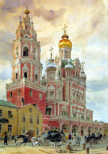 Церковь Успения на Покровке в Москве